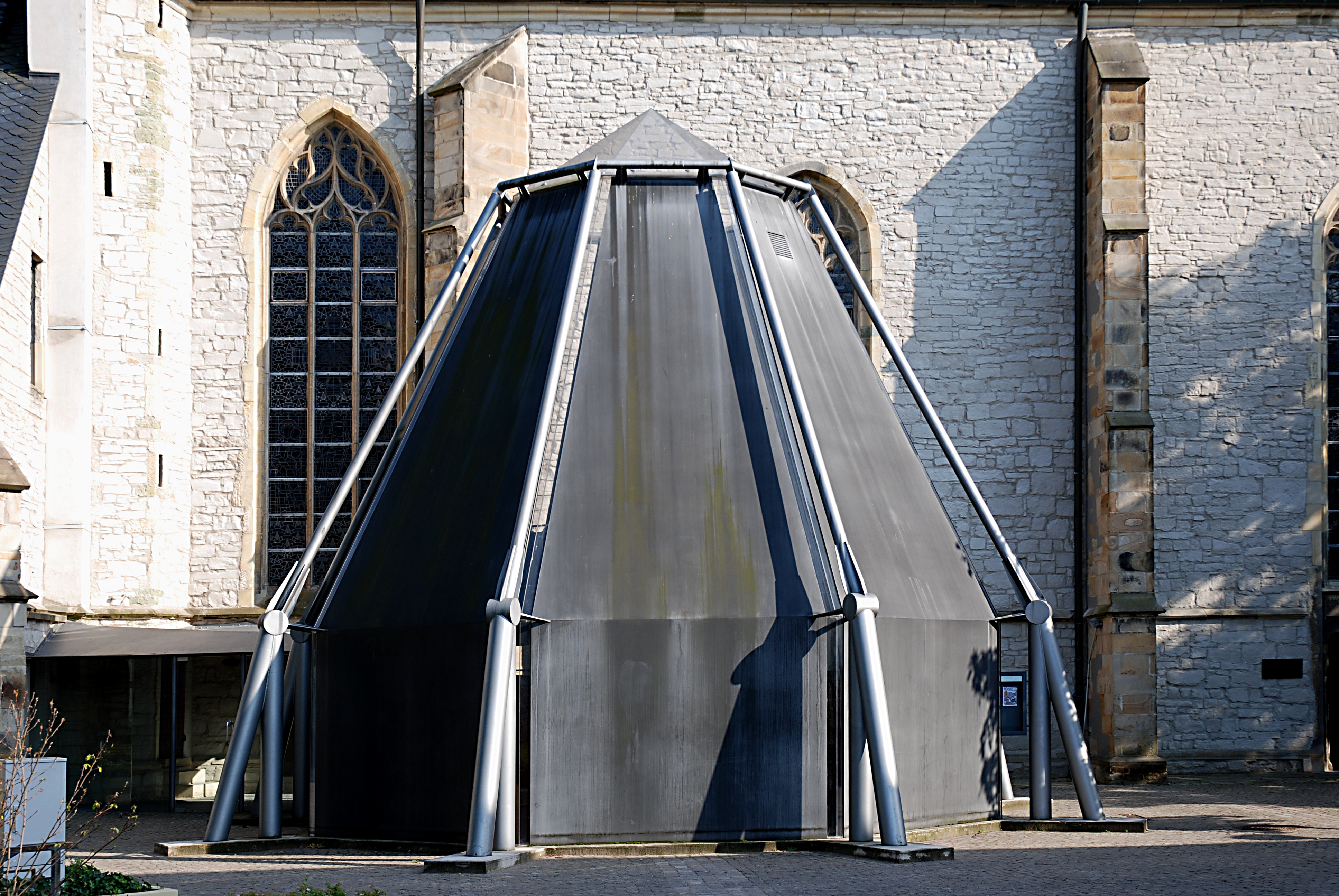 Werne, Kath. Pfarrkirche St. Christophorus, ehem. St. Johannes Bapt., im Vordergrund Sakristei